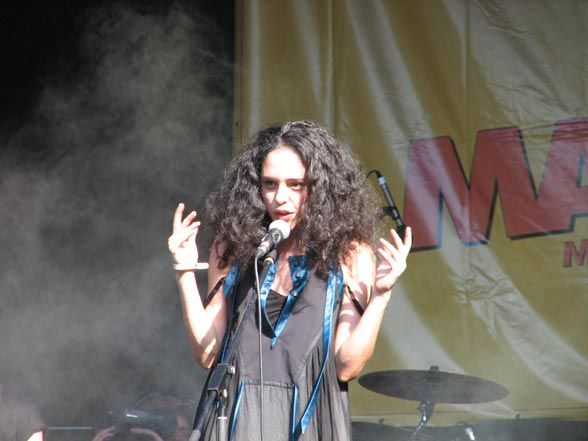 Yasemin Mori, Masstival 2008'de